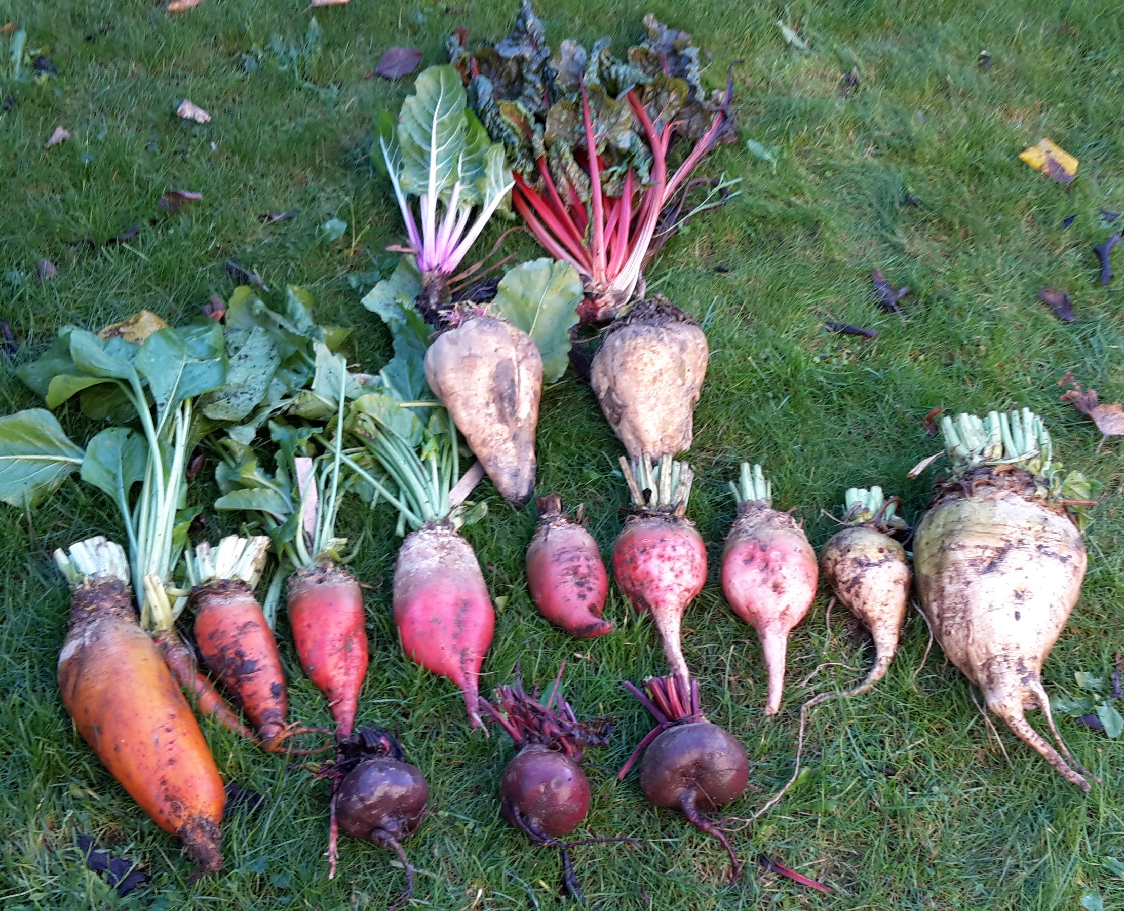 Différentes types de beta vulgaris cultivés, bettes, sucrières, fourragères potagères